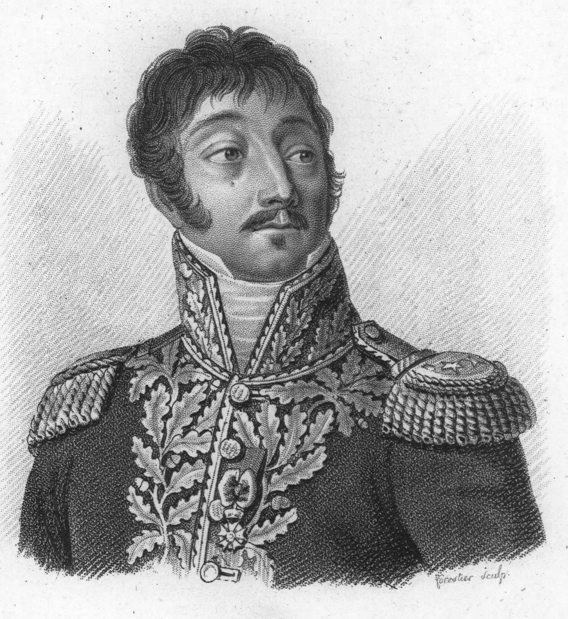 Général_Brayer_Michel_Sylvestre